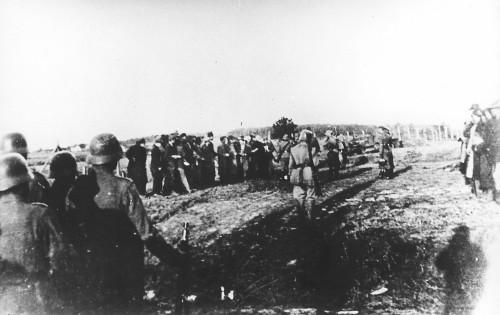 Serb males from Kragujavac being registered before being shot in reprisal